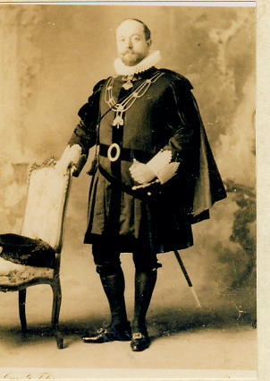 Karte de Visite